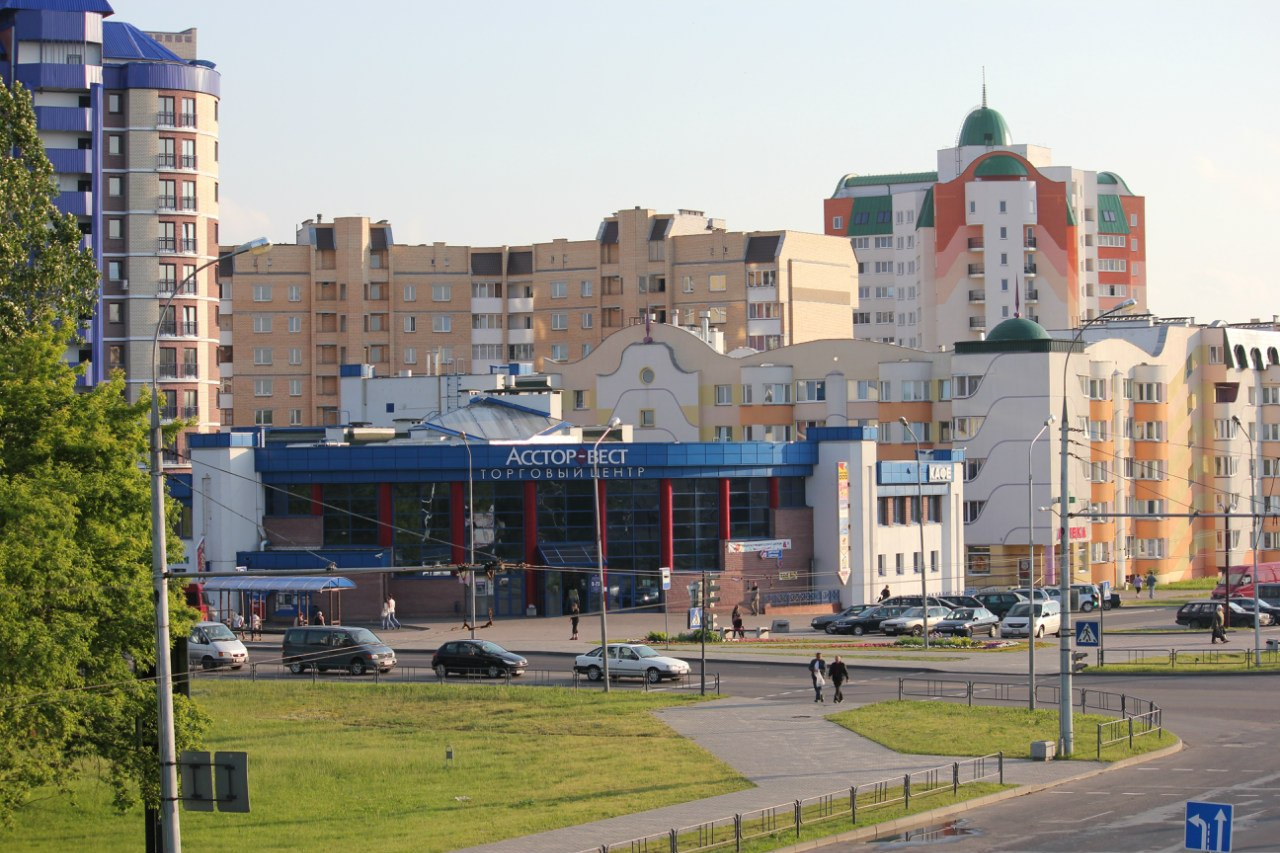 спальный район